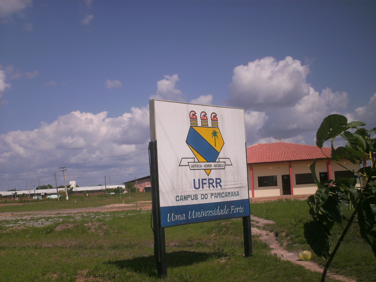 UFRR